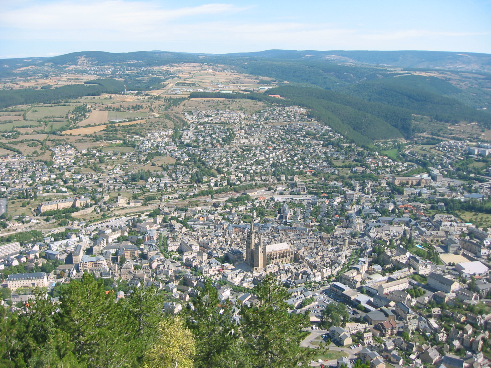 Mende, Lozère, France Vue panoramique depuis la croix du Mont-Mimat D'Ouest (à gauche) en Est (à droite) : photo 3 : Le centre-ville